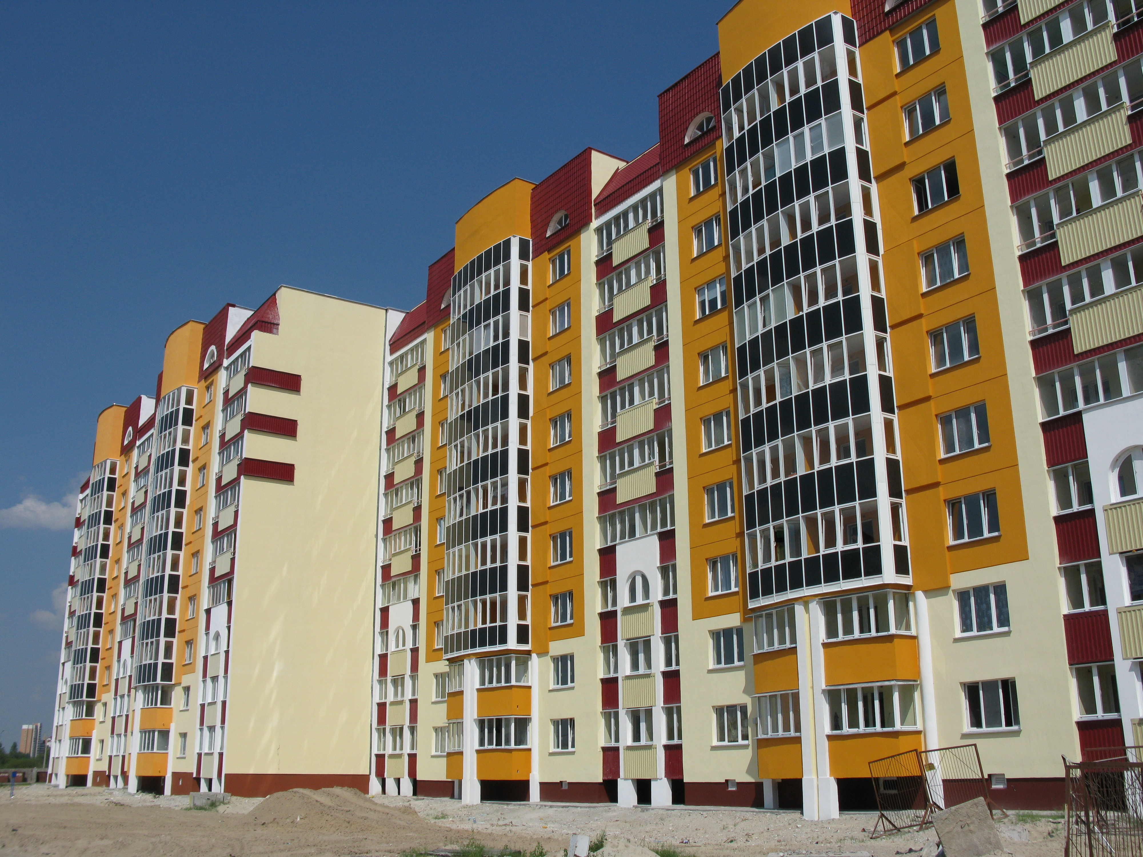 Дома в новом микрорайоне Гомеля.